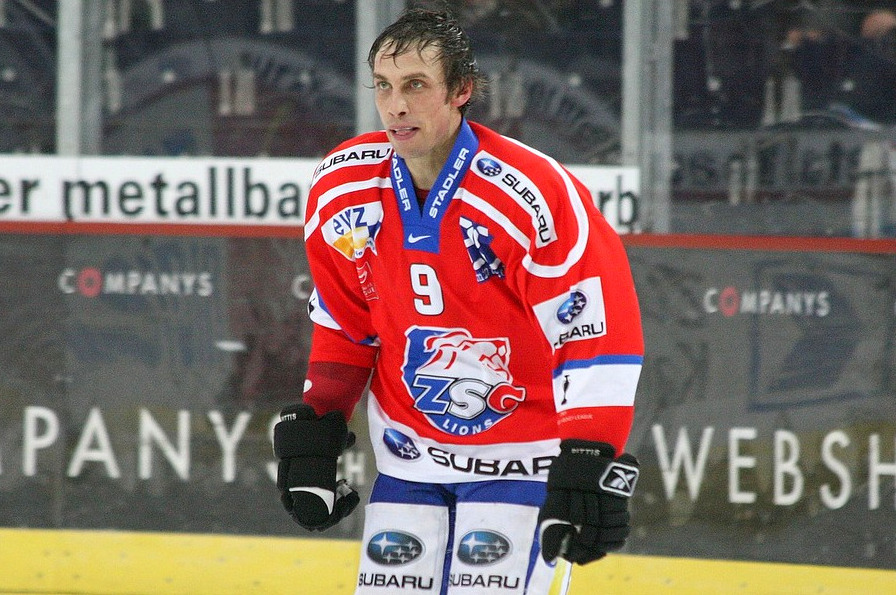 Domenic Pittis avec le maillot du ZSC Lions